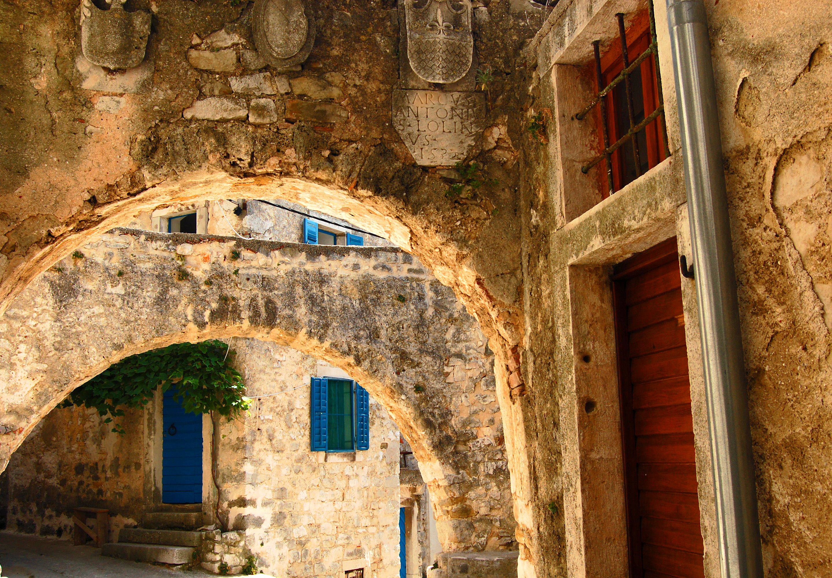 Plomin, Croatia.